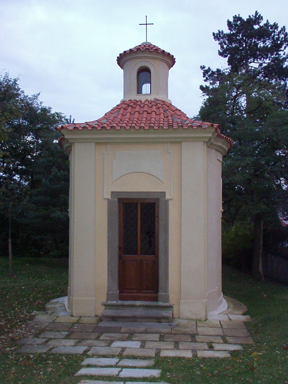 Kaple sv. Michaela archanděla v Praze-Dejvicích